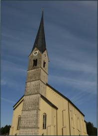 Aussenansicht der Pfarrkirche St. Aegidius Bergen - Chiemgau